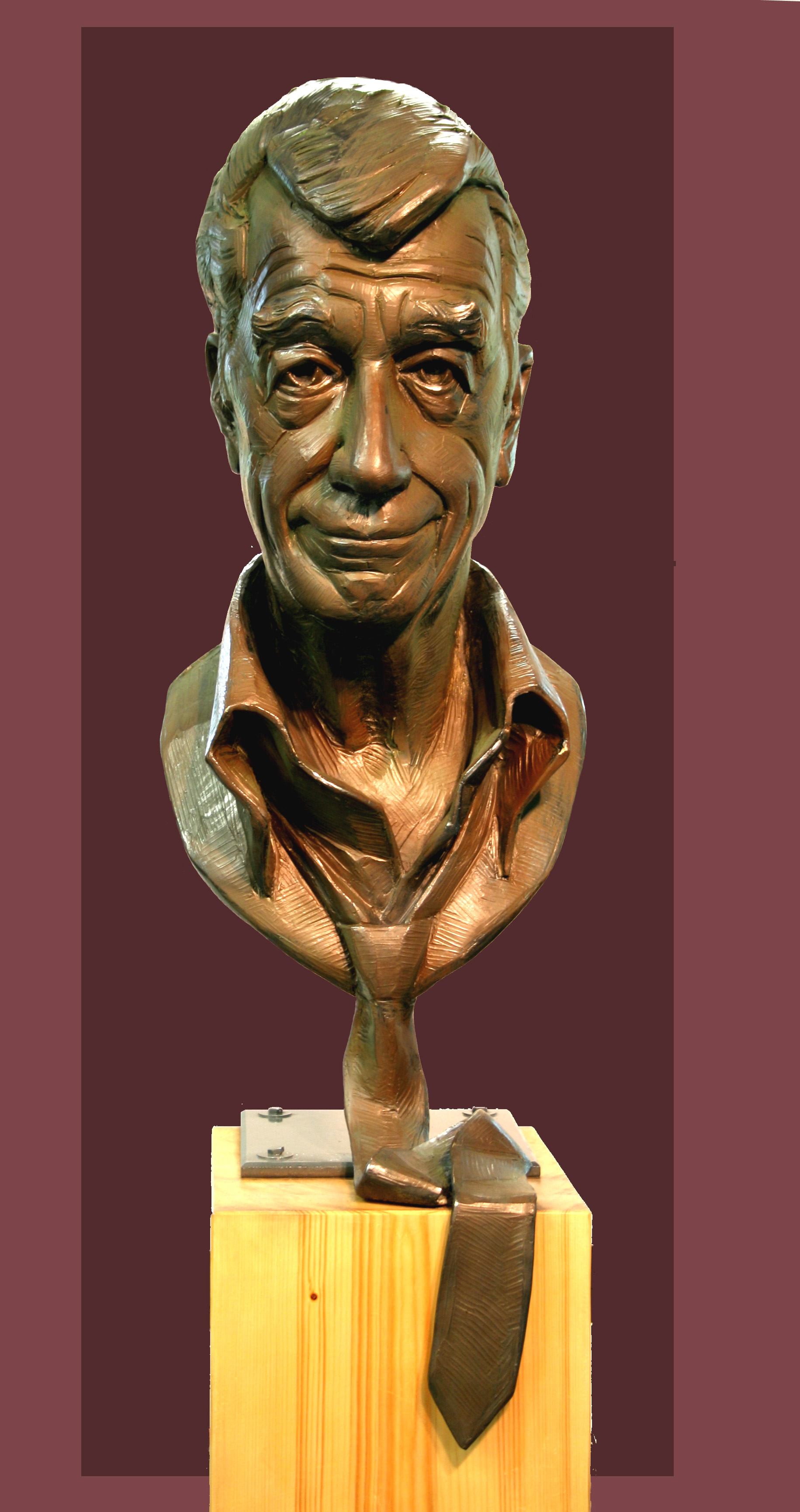 Die Rudi-Carrell-Büste wurde 2006 von Bildhauer Carsten Eggers geschaffen